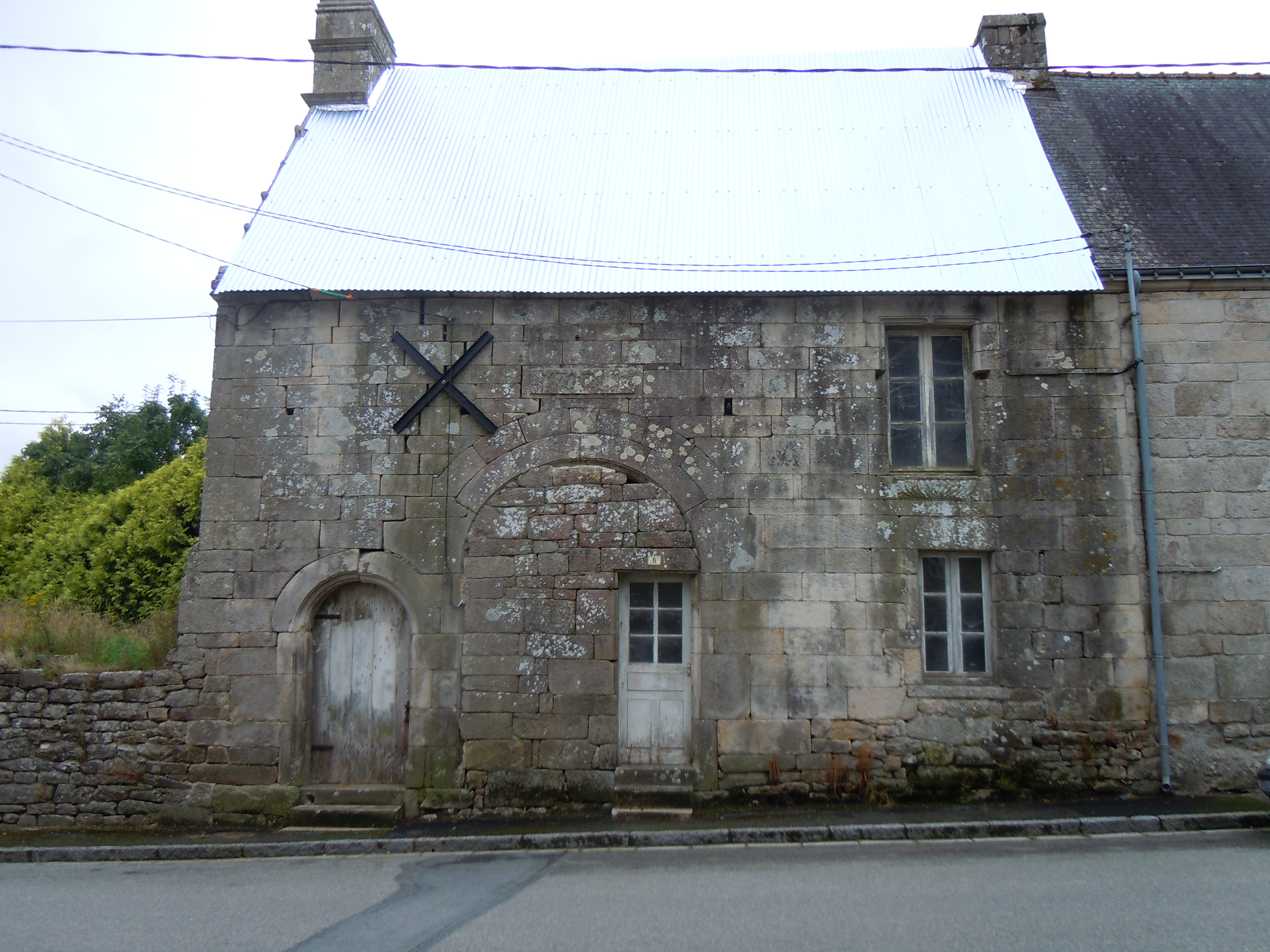 Vieille édifice en pierre de taille du bourg de Priziac portant la date 1572 sur une cartouche. il est inscrit aux monuments historiques depuis 1925. .